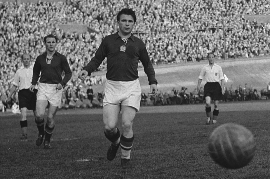 Nándor Hidegkuti and Ferenc Puskás during a football match between Amsterdam XI and Budapest XI